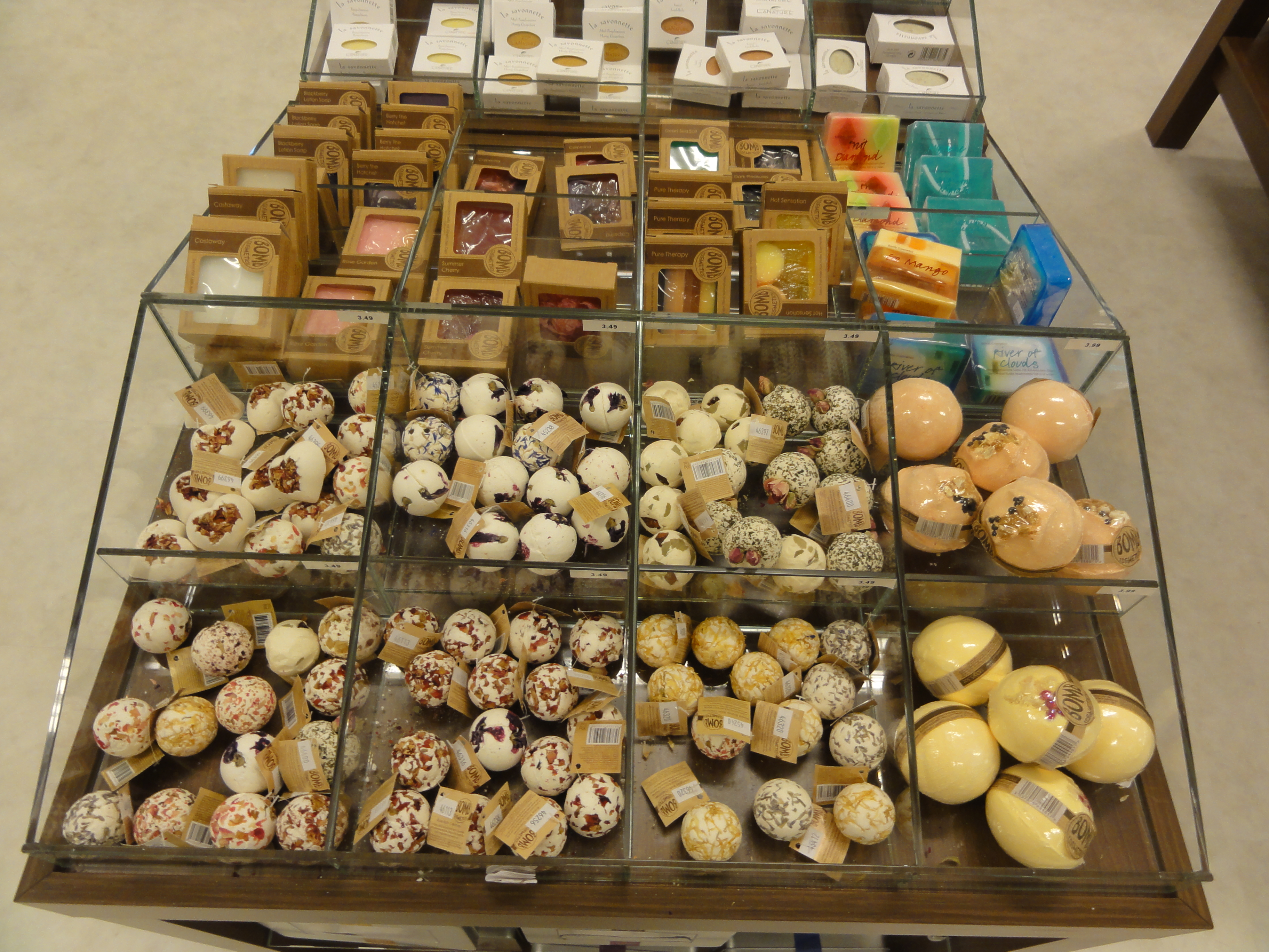 Regensburg - Badekugeln